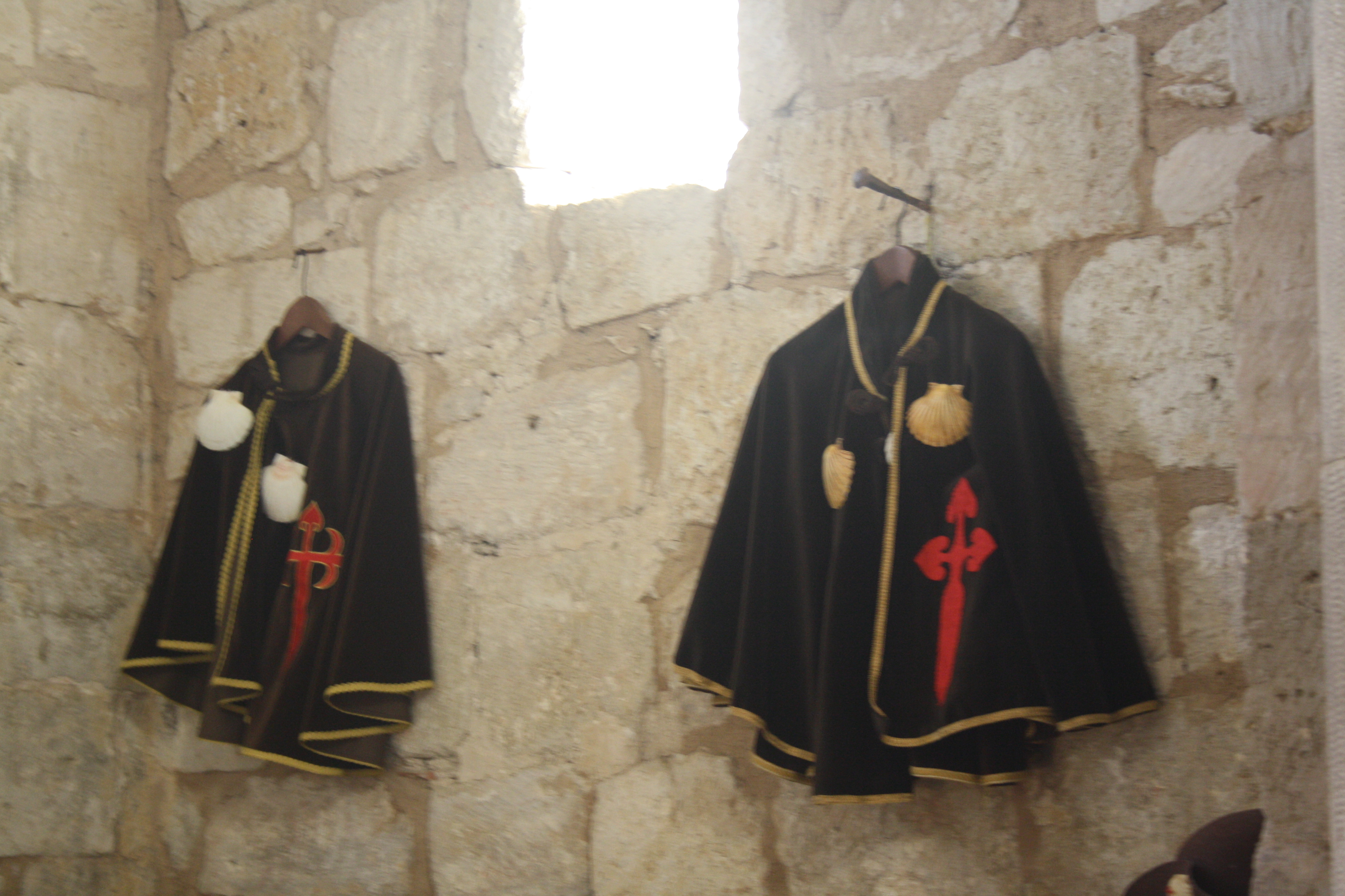 mantelle appese all'interno dell'Ermita di san Nicòlas di Ponte Fitero , ospizio per pellegrini lungo il cammino di Santiago, che i volontari della Confraternita di san Jacopo di Compostella indossano durante l'antico rito della lavanda dei piedi